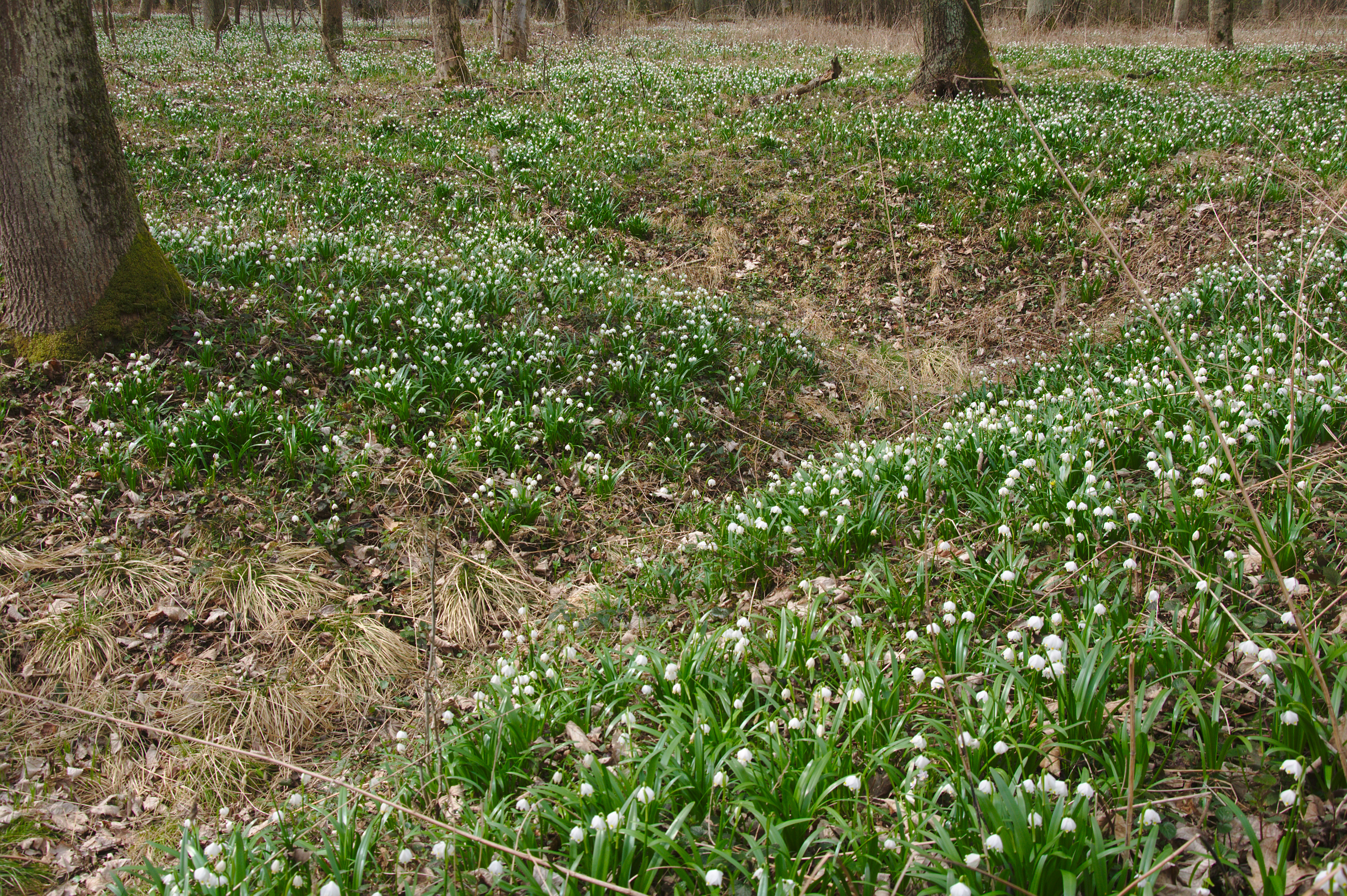 Přírodní rezervace Litovelské luhy, okres Olomouc